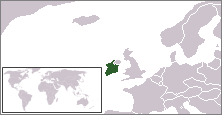 Localização do território do Estado Livre Irlandês em 1922.